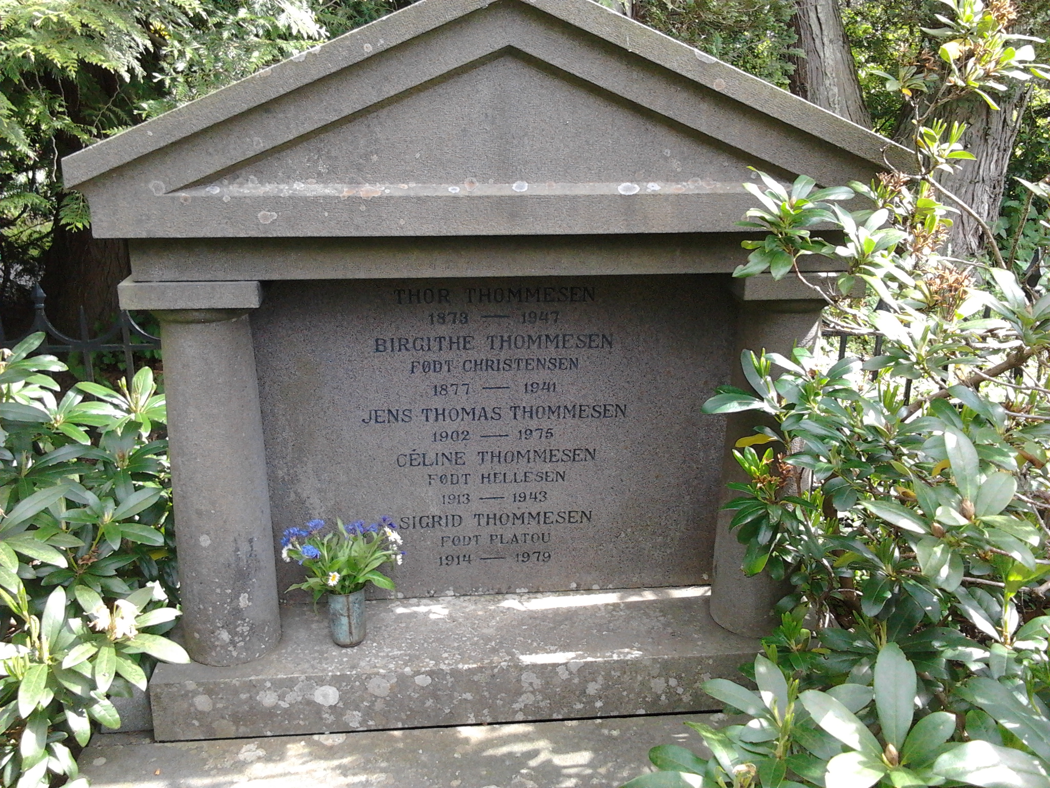 Grav på Arendal kirkegård